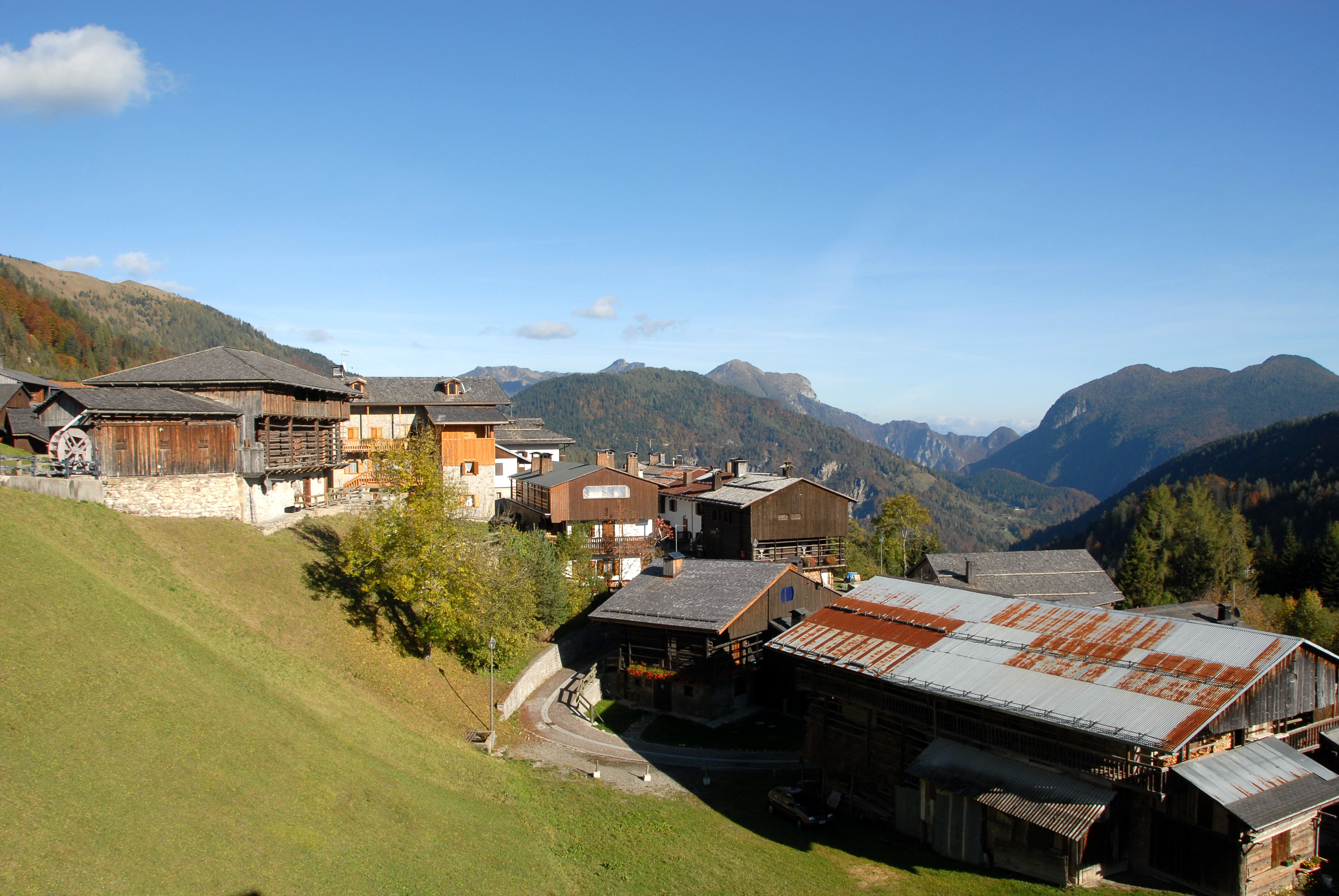 View at Sauris di sopra in the community Sauris, region Friuli Venezia-Giulia, Italy